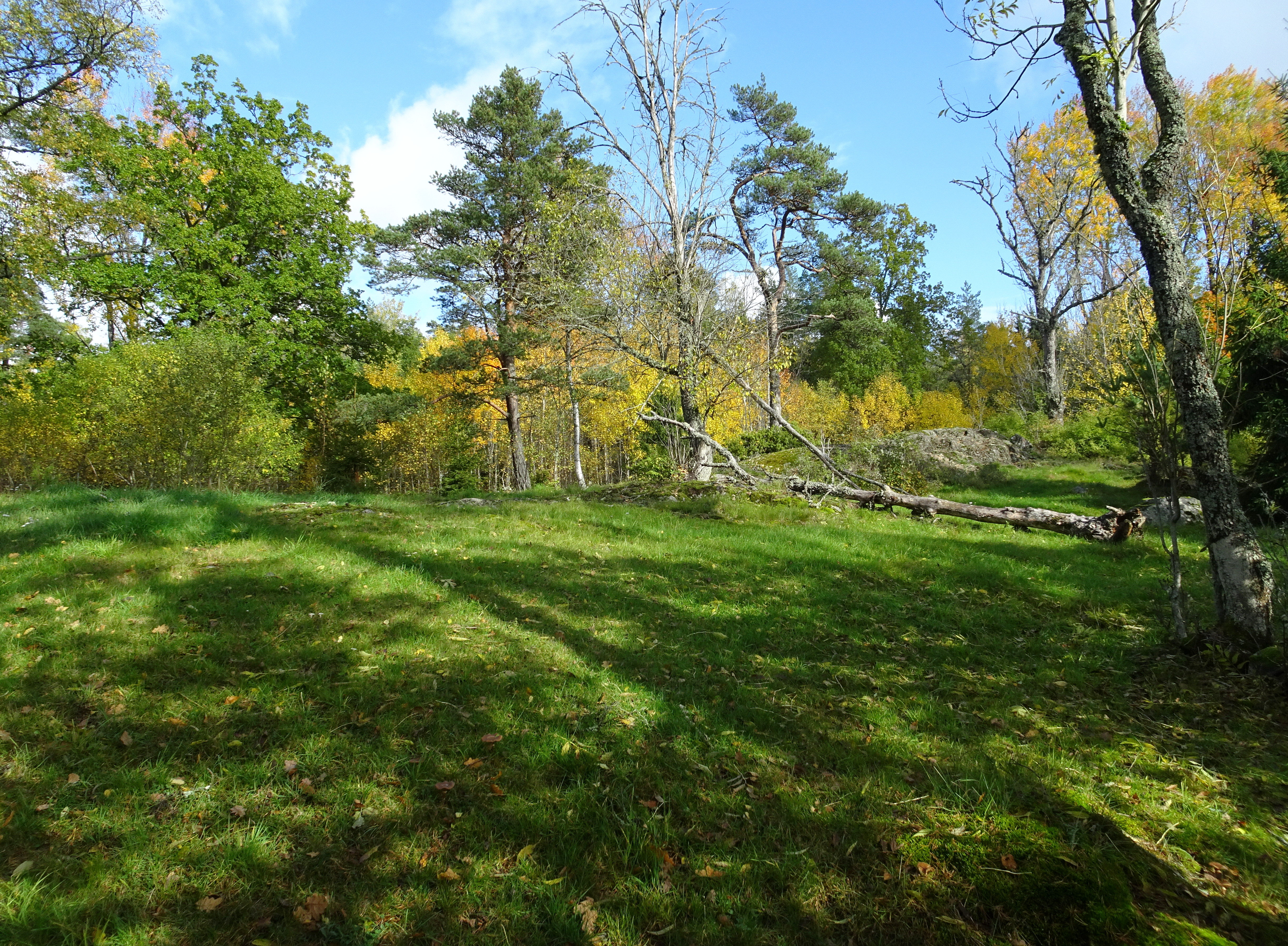 Årsta gamla gård, RAÄ-nummer Österhaninge 39:1